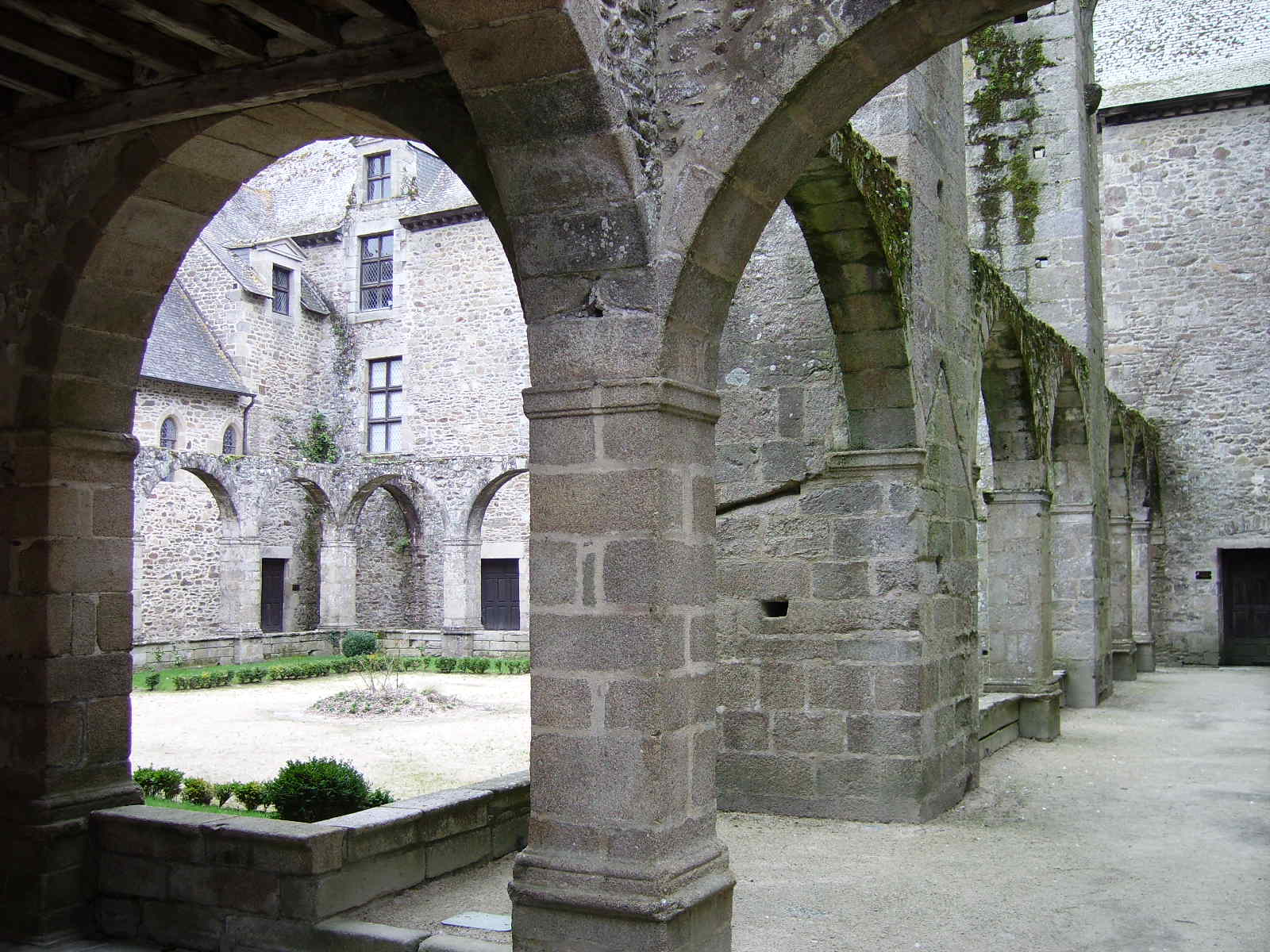 Klostro de la monaĥejo de Léhon